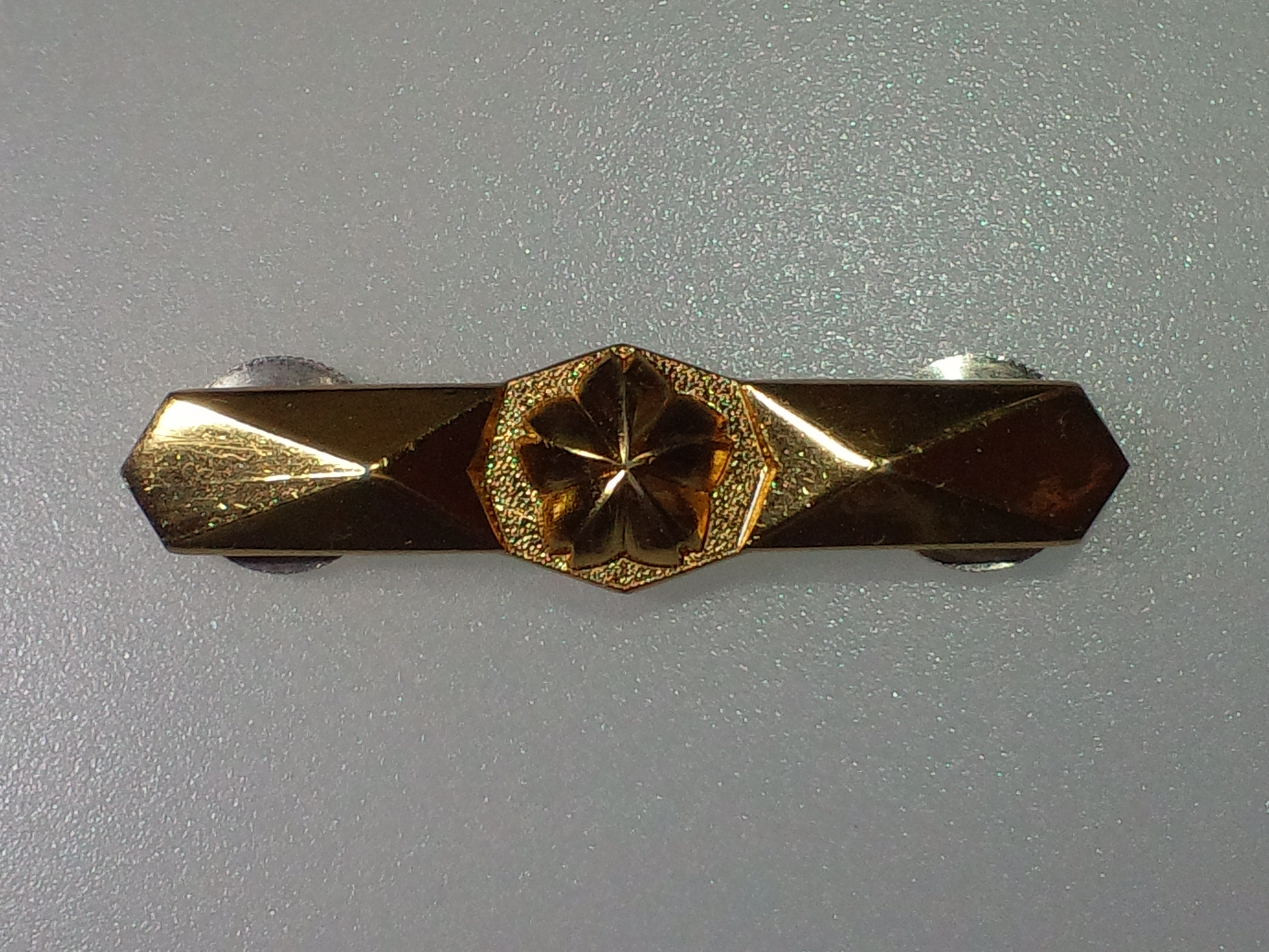 服務指導准尉